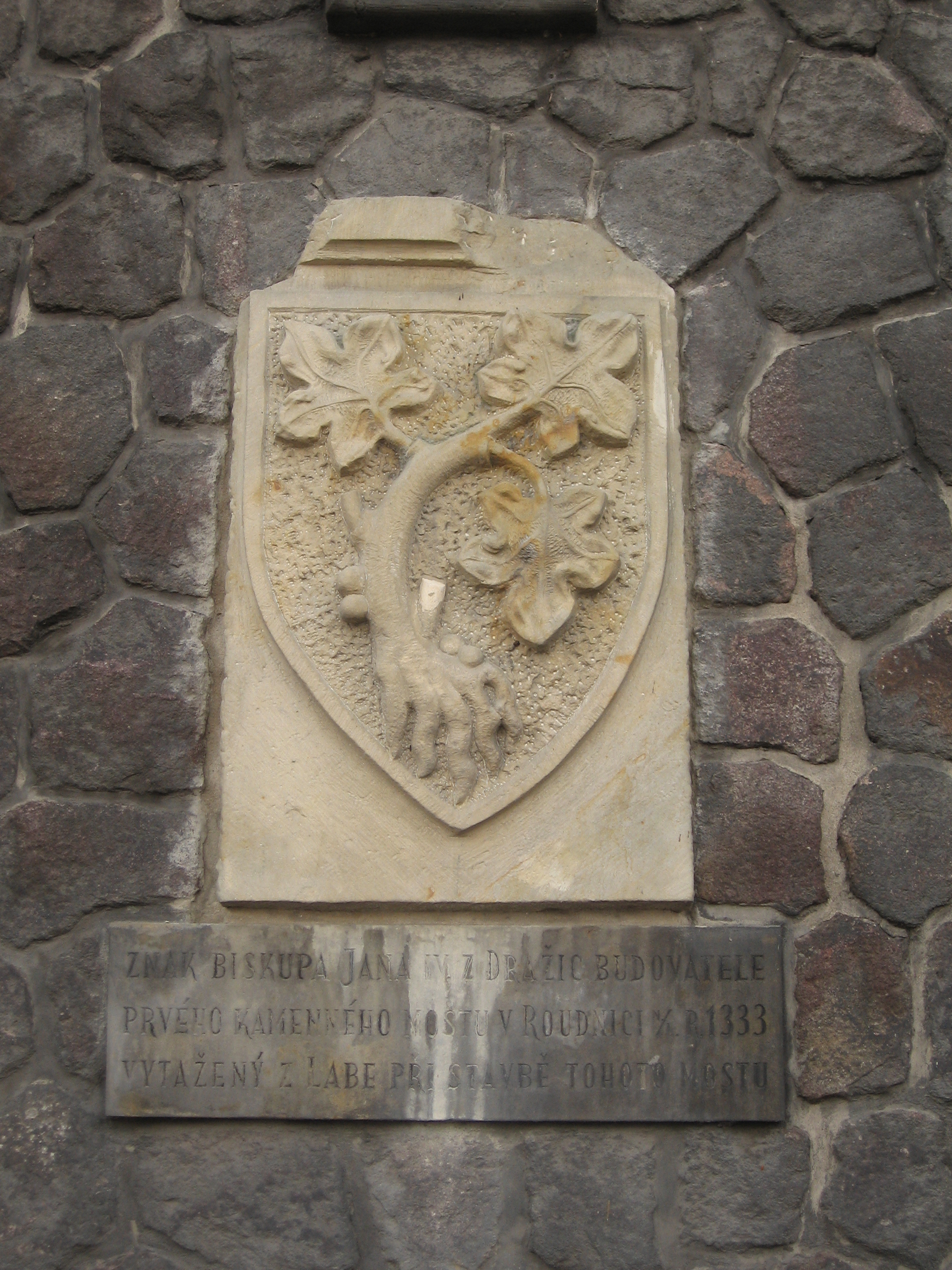 Na desce je nápis: „Znak Biskupa Jana IV. z Dražic, budovatele prvého kamenného mostu v Roudnici n/L. r. 1333 vytažený z Labe při stavbě tohoto mostu.“